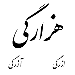 تصویر گویش هزارگی به همراه تلفظ در برخی مناطق هزاره‌جات